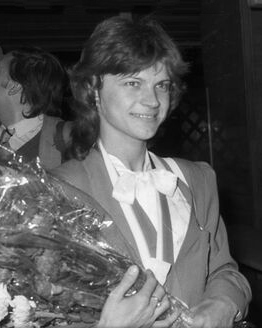 Paula Ivan in Bucharest